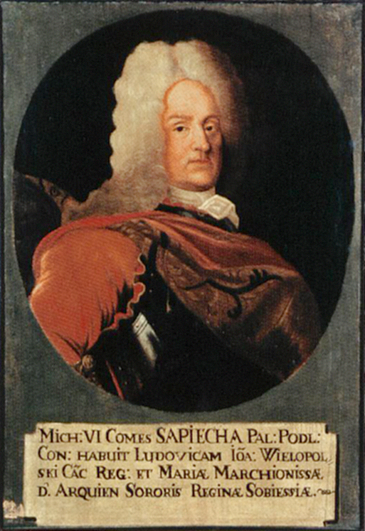 Беларуская (тарашкевіца): Партрэт Міхала Юзэфа Сапегі (Michał Juzef Sapieha) гербу «Ліс» (1670—1738), дзяржаўнага і вайсковага дзеяча Вялікага Княства Літоўскага, чашніка і стражніка вялікага літоўскага, пісара польнага літоўскага, ваяводы падляскага